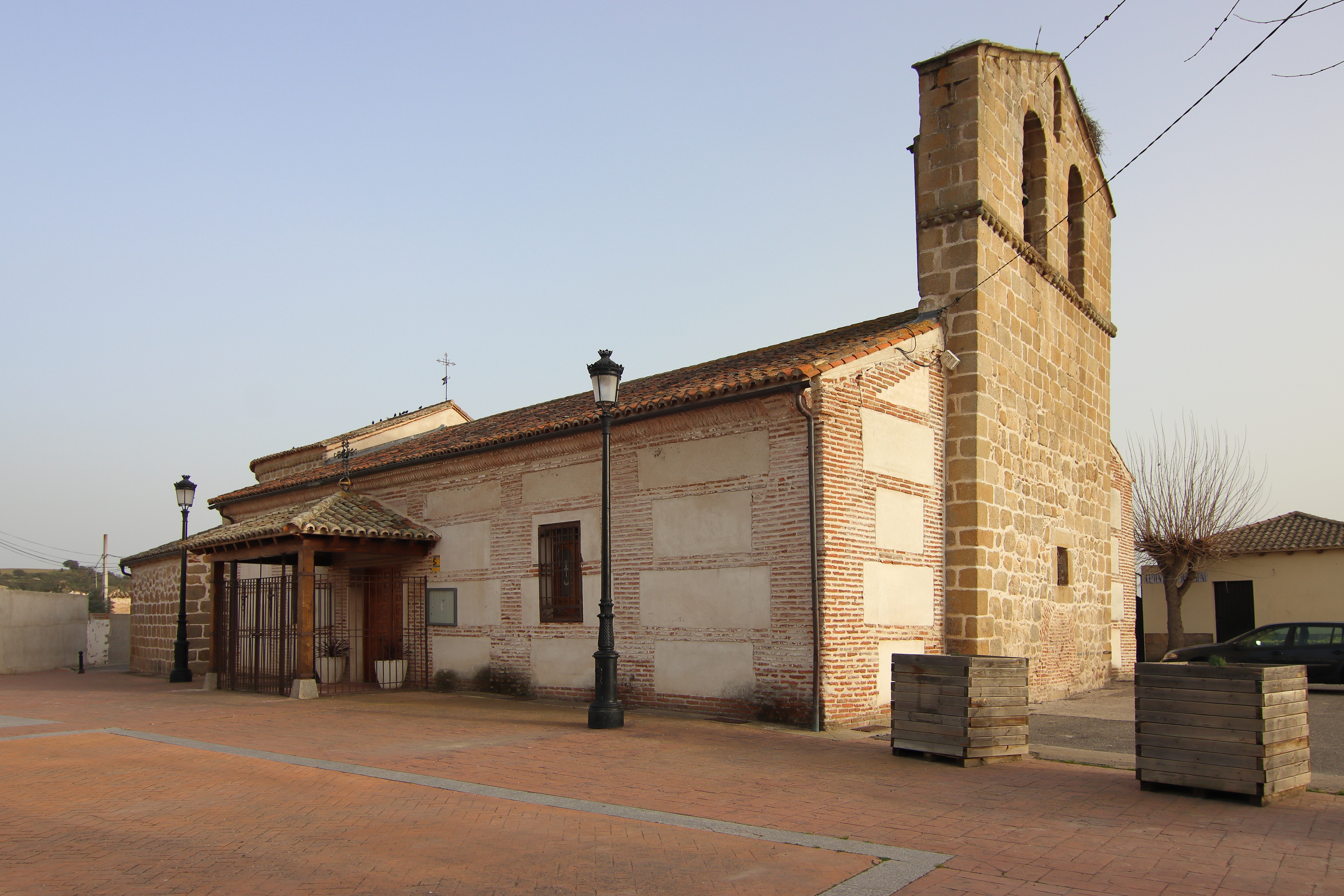 Iglesia de Santiago Apóstol, Cardiel de los Montes, fachada norte y oeste